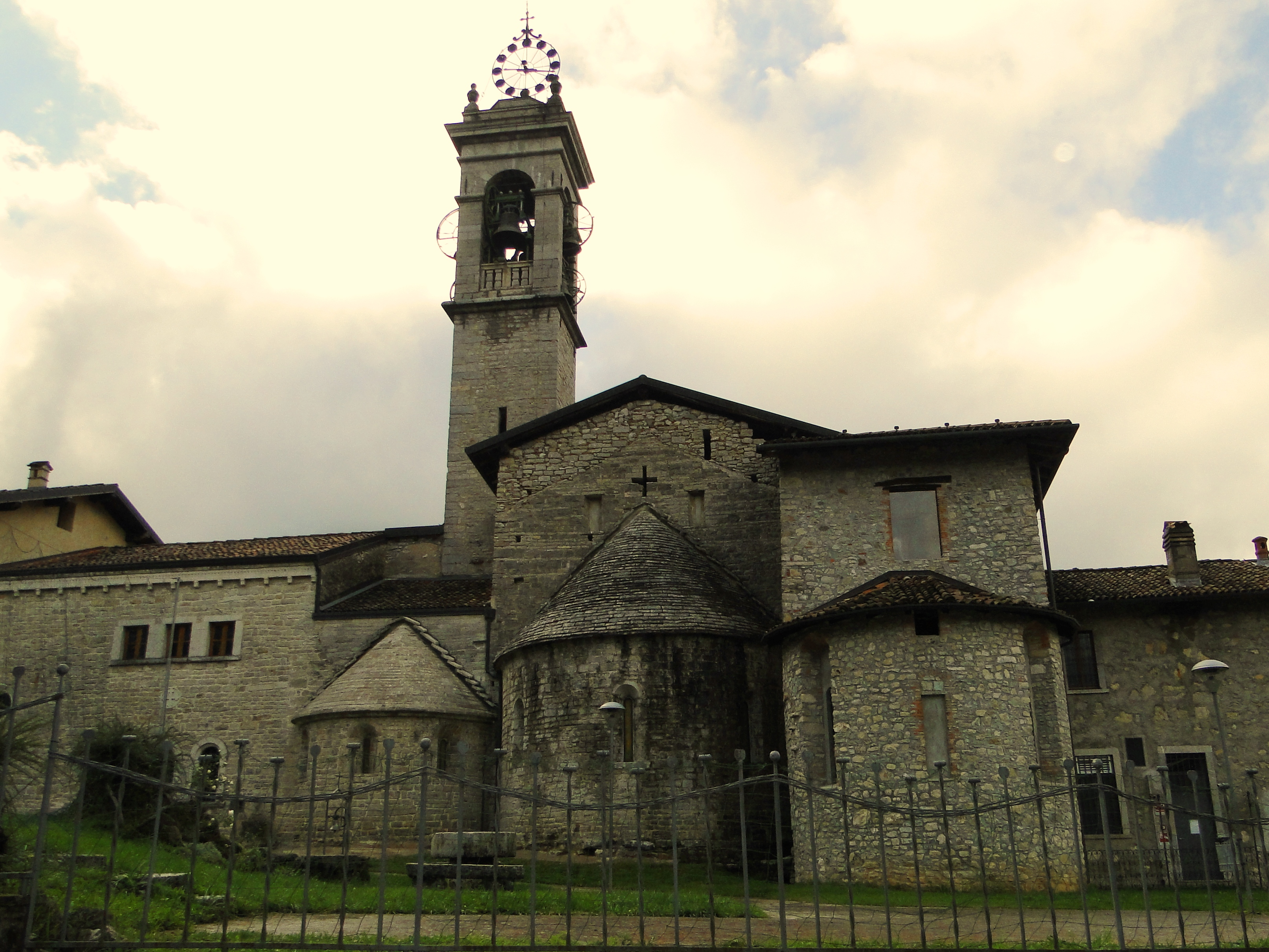 Abbazia san Benedetto in Vallalta, Abbazia di Albino (BG). Vista da dietro della chiesa